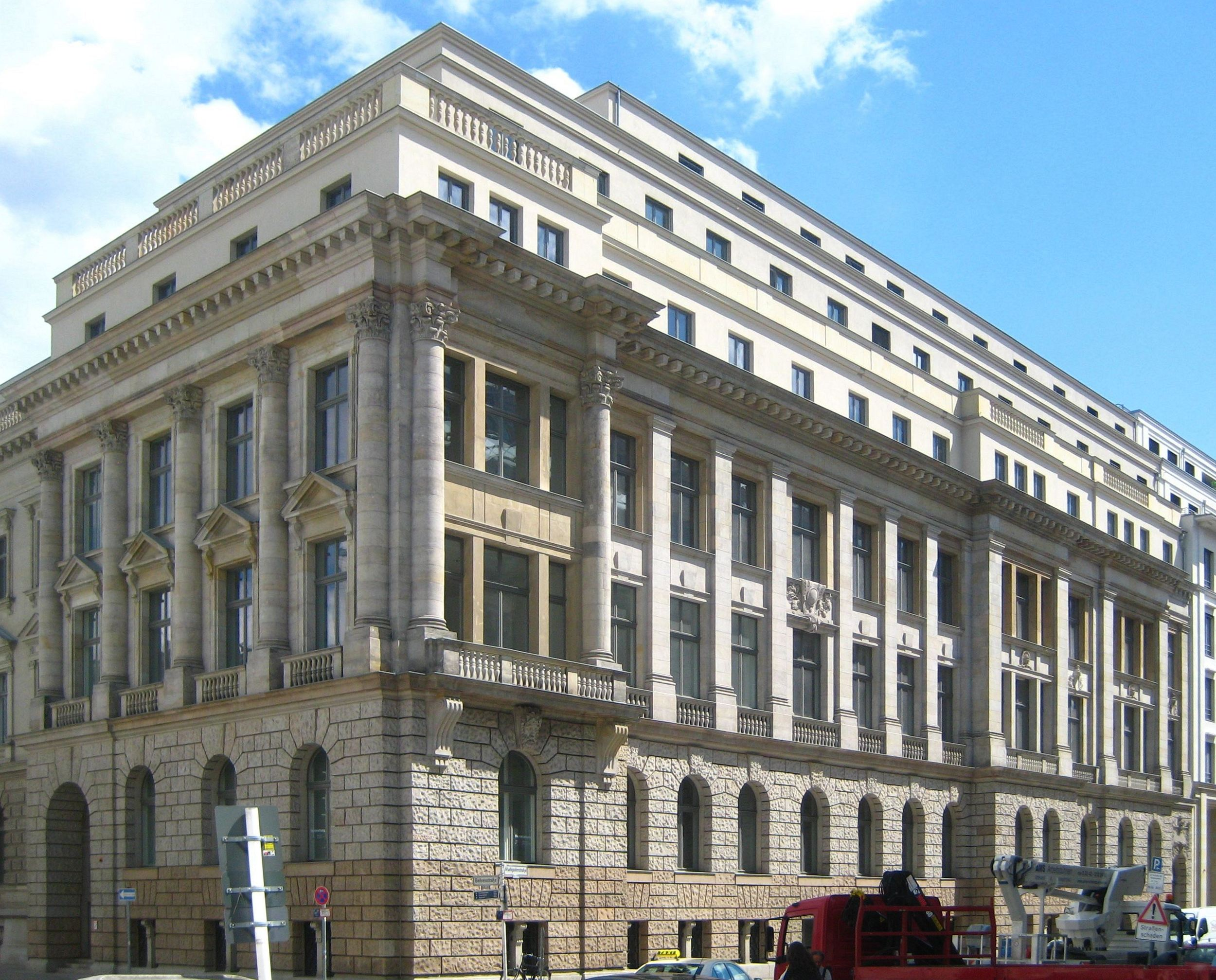 Die ehemalige Pommersche Hypotheken-Aktienbank an der Ecke Behrenstraße und Markgrafenstraße (rechts) in Berlin-Mitte; 1895-1896 errichtet von den Architekten Wittling & Güldner; 1923 von Ludwig Hoffmann in den benachbarten Komplex der Geschäftszentrale der Dresdner Bank integriert; das Gebäude steht unter Denkmalschutz The former Pommersche Hypotheken-Aktienbank at the corner of Behrenstraße and Markgrafenstraße (right) in Berlin-Mitte; built 1895-1896 by architects Wittling & Güldner, it was integrated into the neighboring complex of the Dresdner Bank by Ludwig Hoffmann in 1923; the building is landmarked